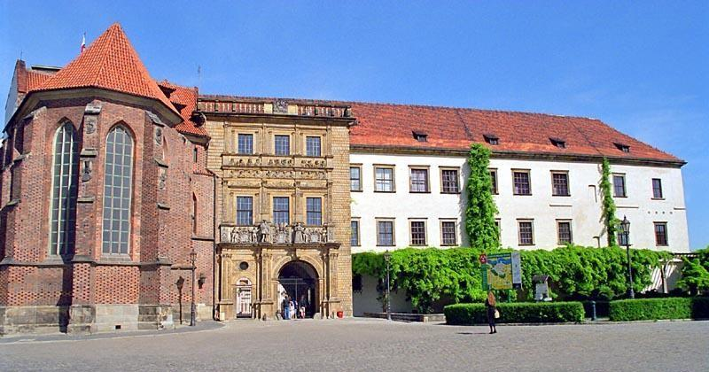 Warszawa (Polska)